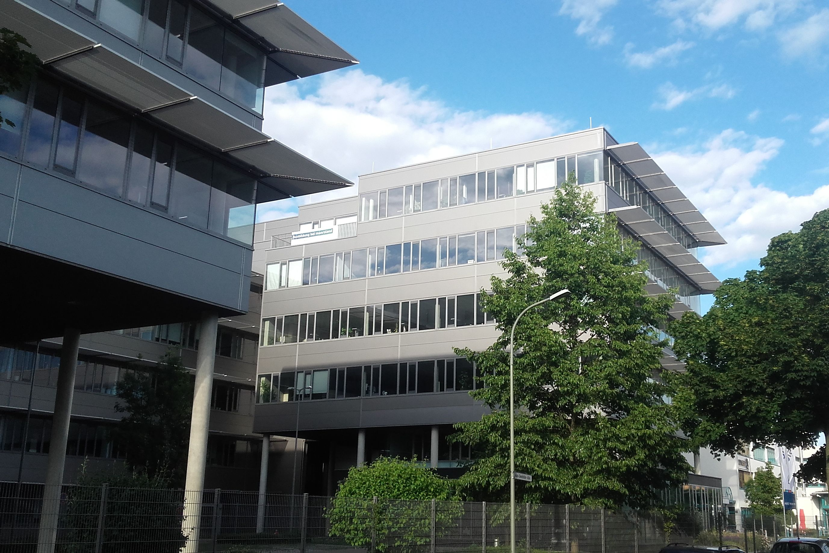 Ansicht Bürogebäude manroland Goss web systems in Augsburg